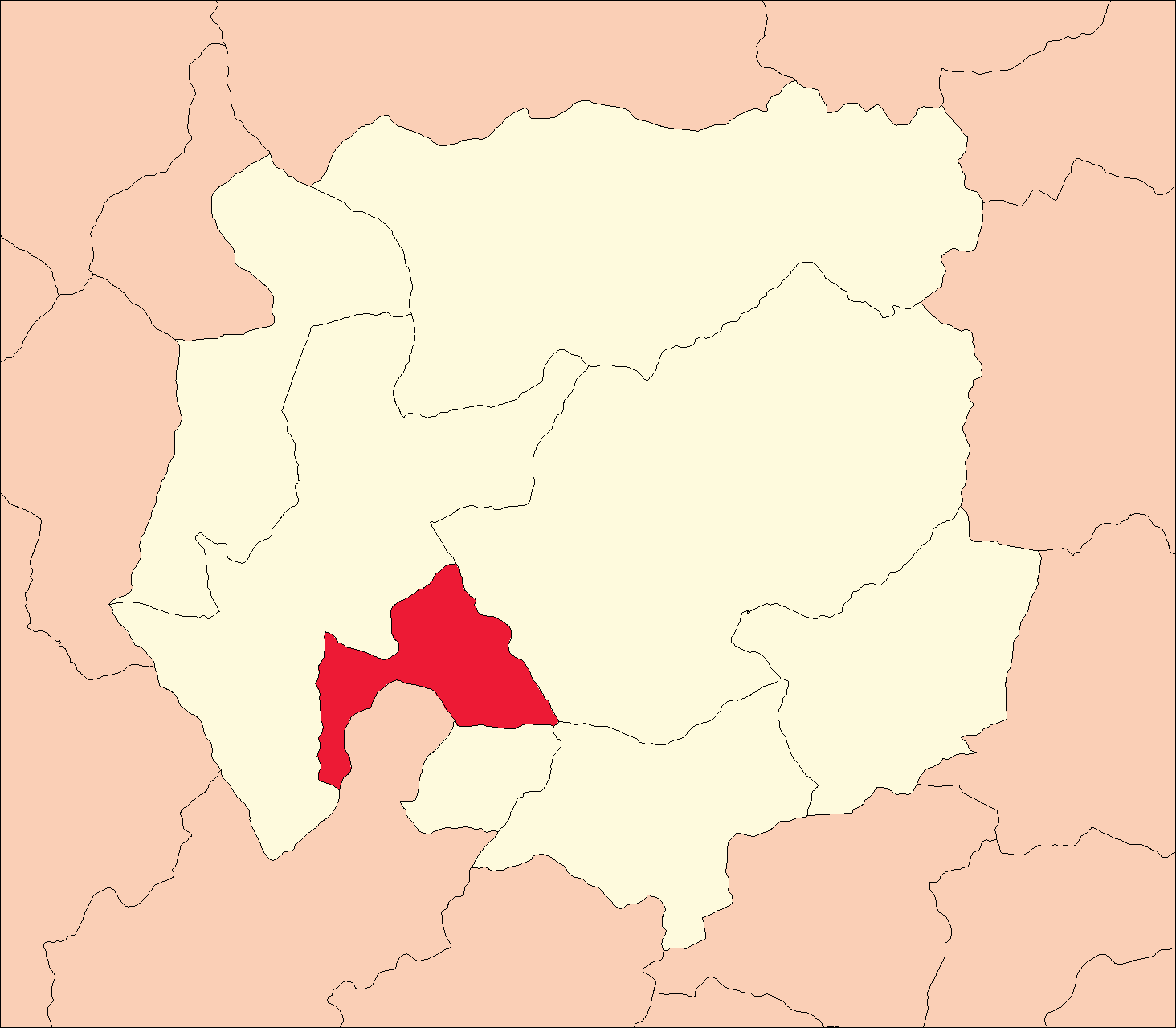 Ubicación del distrito de Cáhuac.